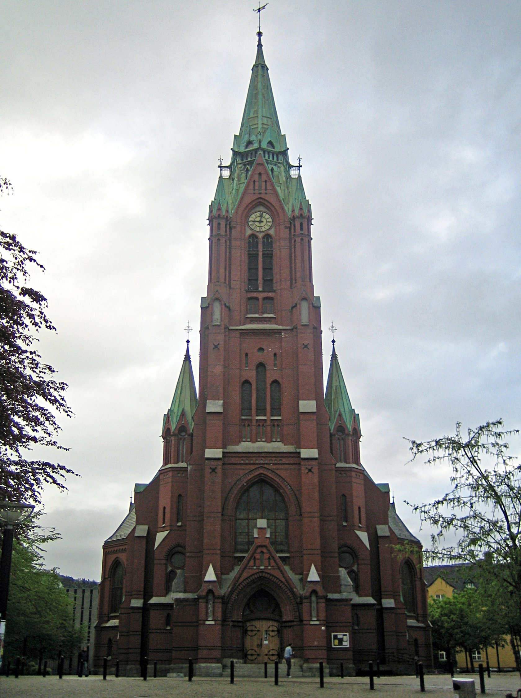 Johanneskirken (The Church of John) in Bergen, Norway